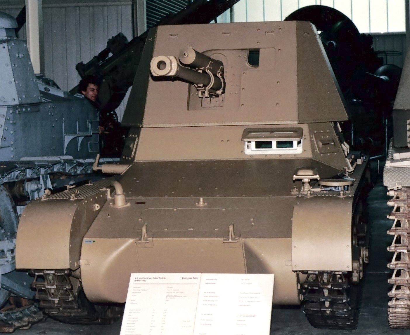 Panzerjäger I at Koblenz, Alkett type gunshield with five sides